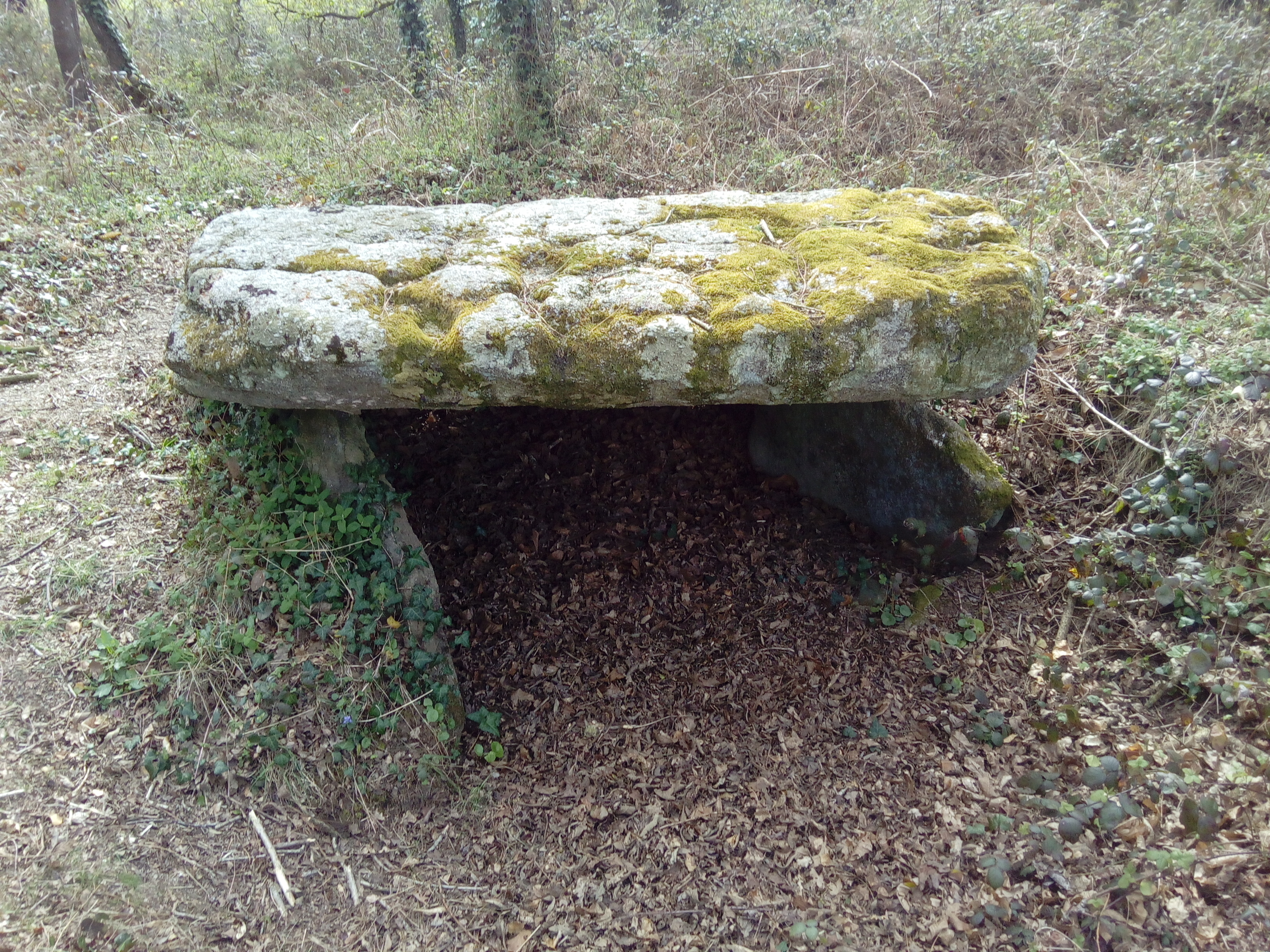 Dolmen